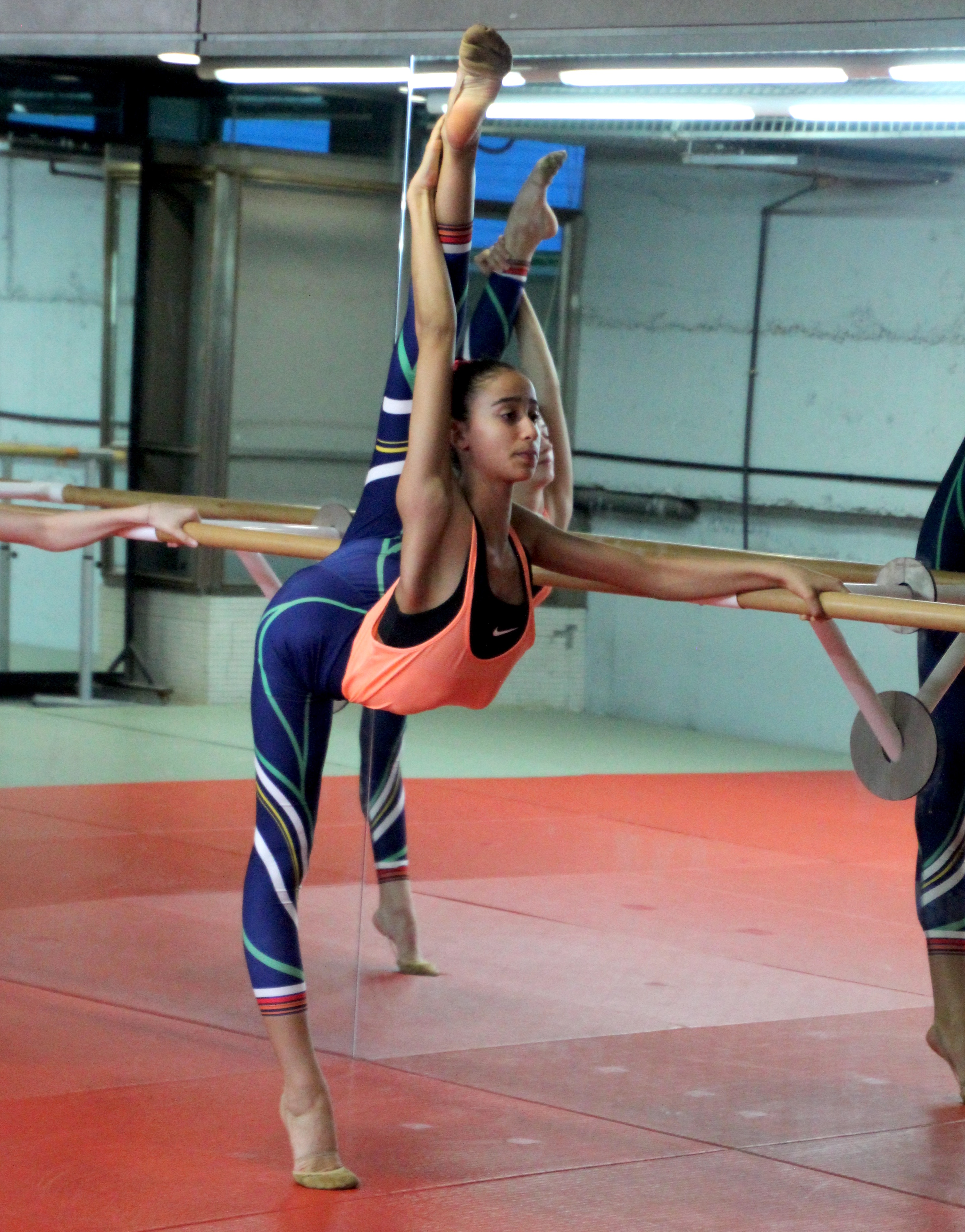 Emma Reyes entrenando con el conjunto español júnior de gimnasia rítmica en el CAR de Madrid en mayo de 2017.